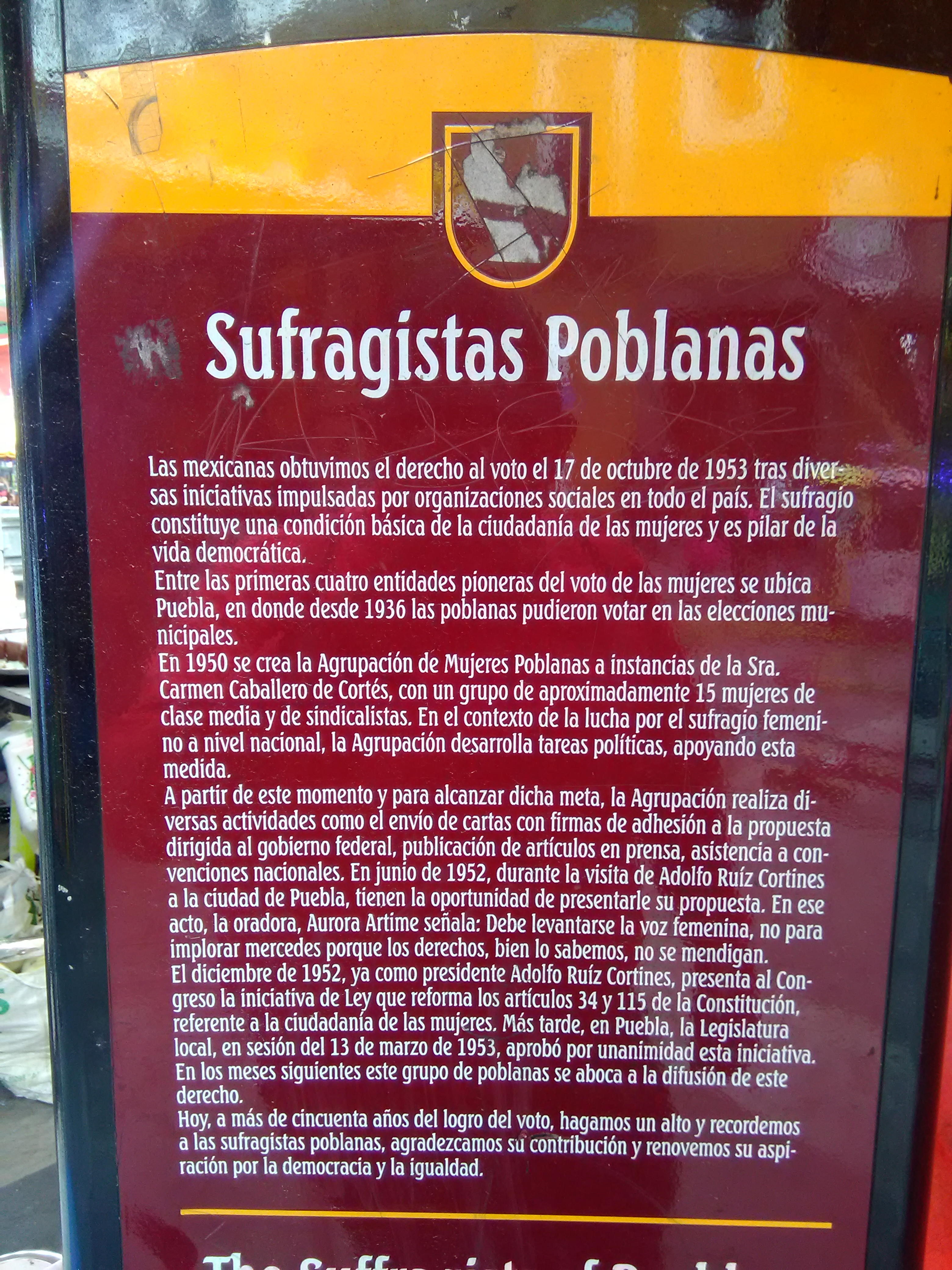 Placa homenaje a la mujer sufragista poblana en el centro histórico de la ciudad de Puebla, México